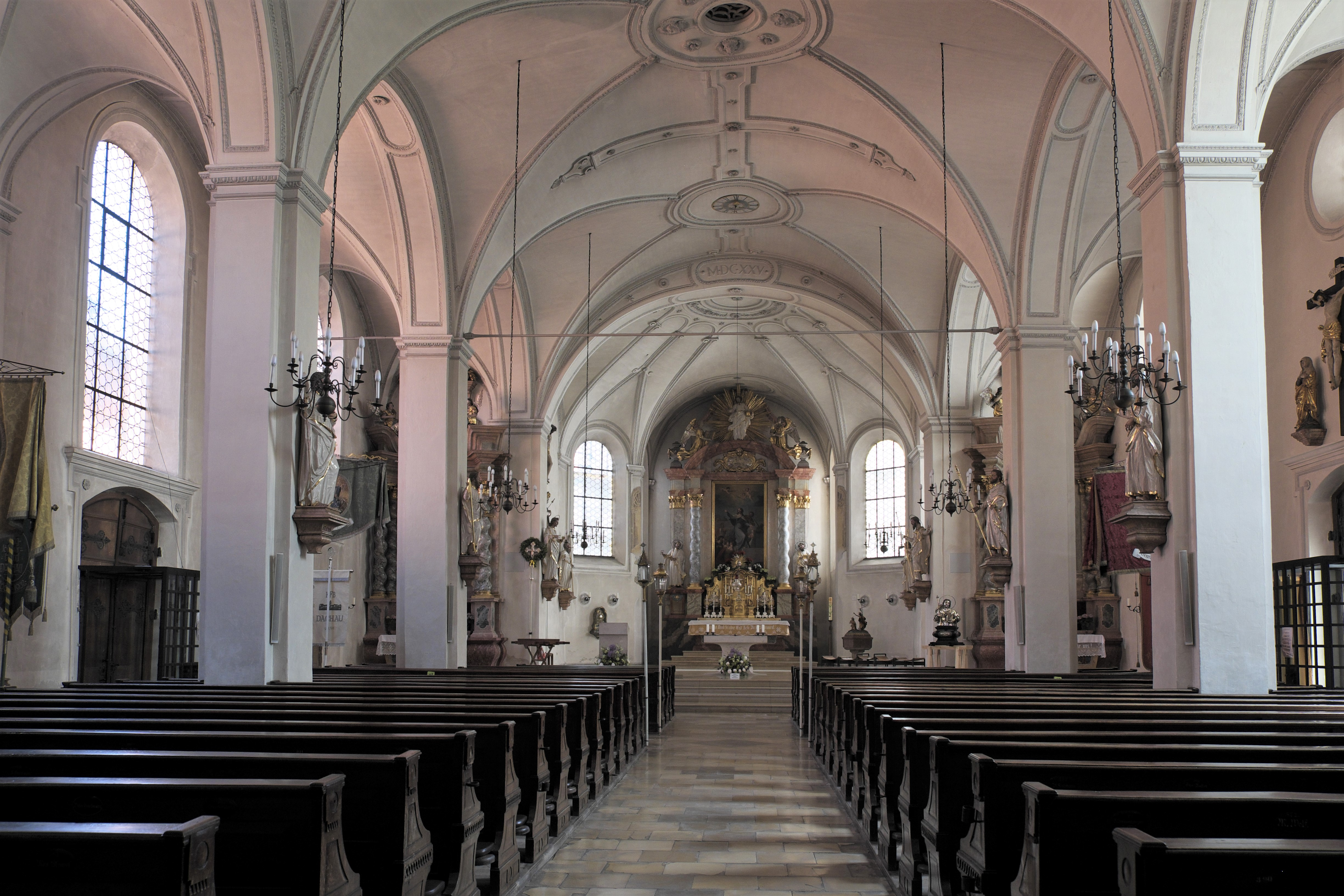 Katholische Pfarrkirche St. Jakob in Dachau (Bayern, Deutschland), Innenraum